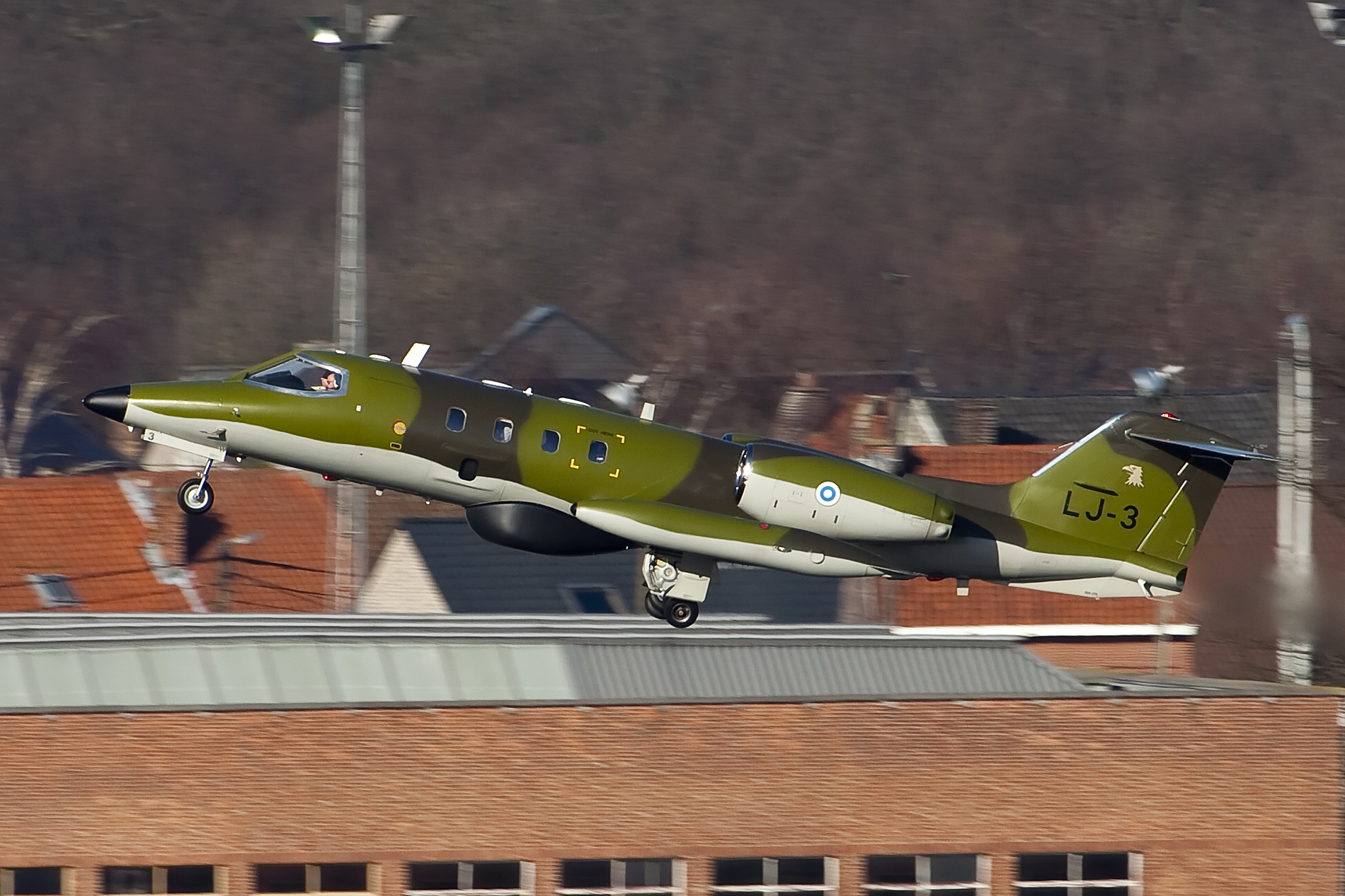 Brussel